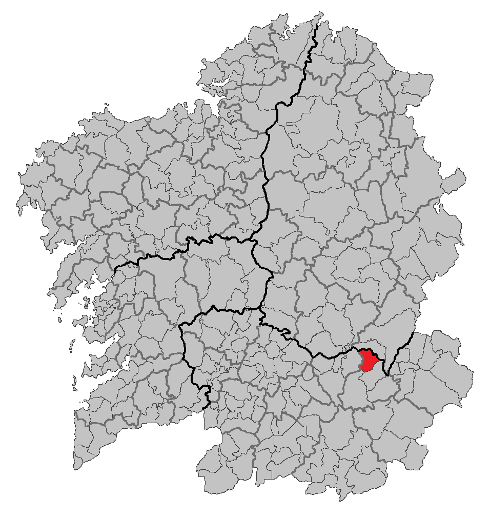 Mapa coa localización do concello de San Xoán de Río.